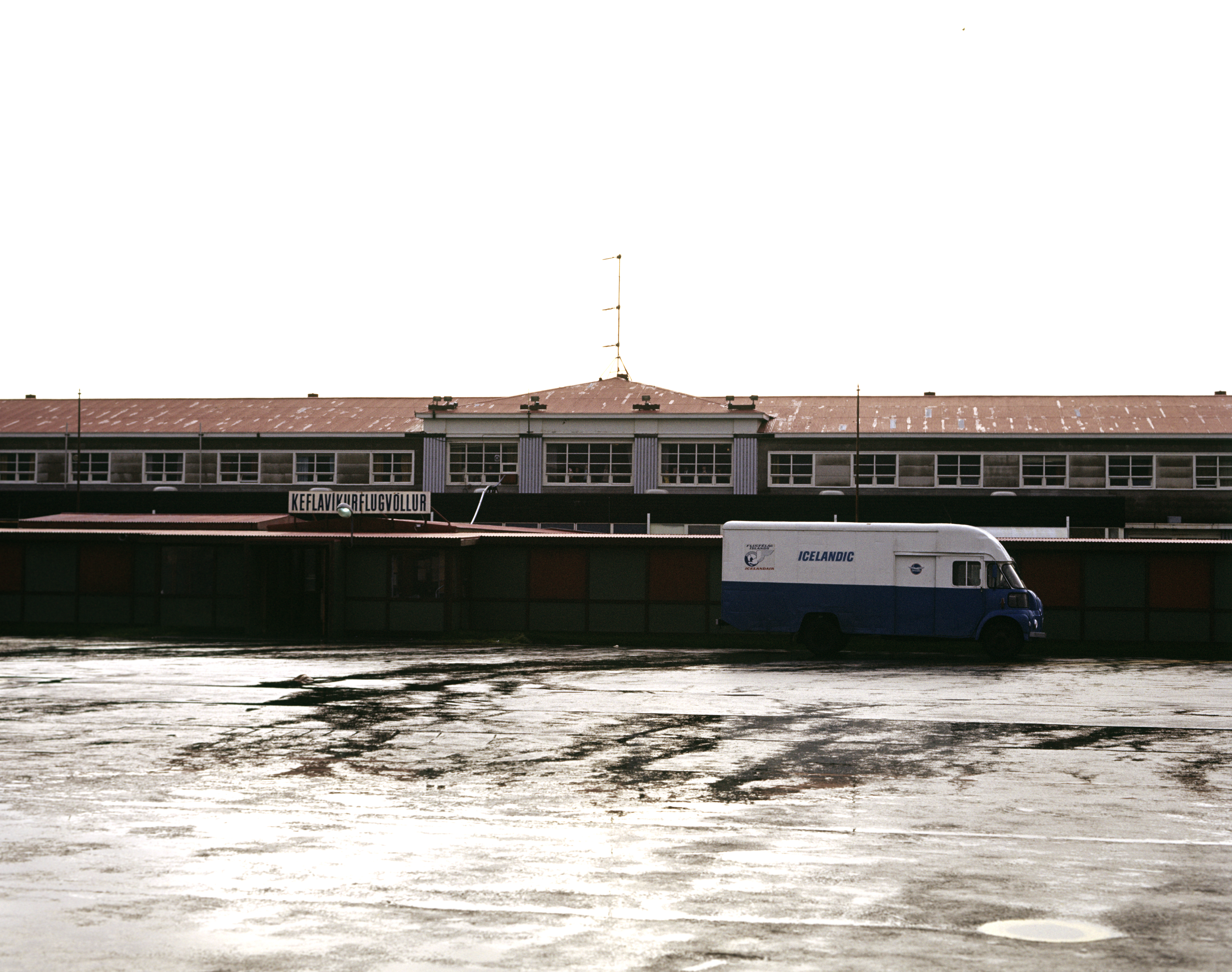 Der alte Flughafen von Keflavík